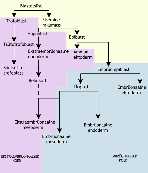 Diagramm näitab erinevate kudede päritolu inimese ja reesusmakaagi embrüos. Katkendjoon viitab ekstraembrüonaalse mesodermi võimalikule topeltpäritolule.